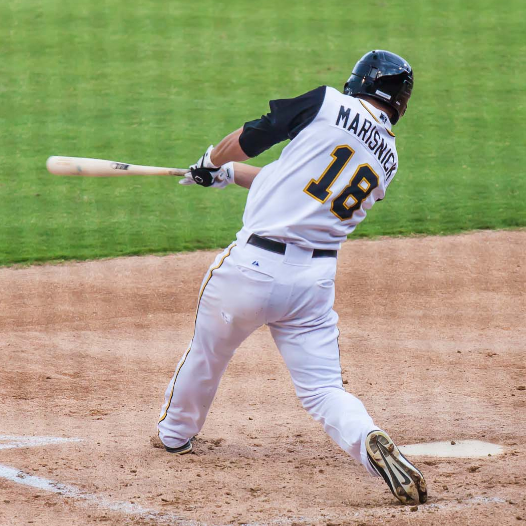 Jake Marisnick